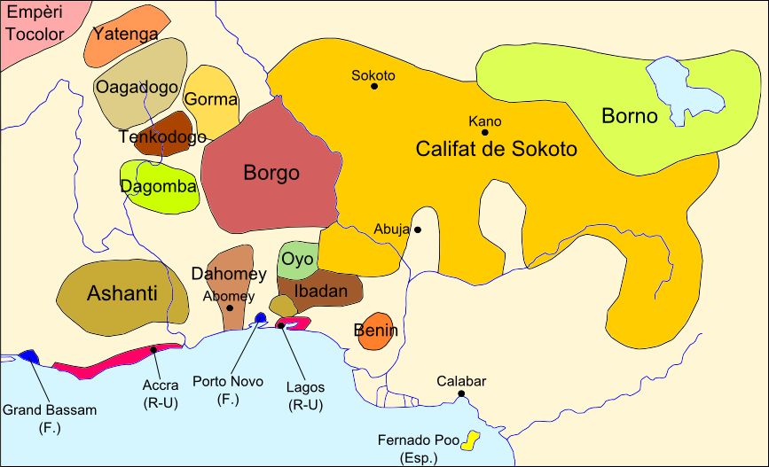 Situacion politica dau Golf de Guinèa vèrs 1875.